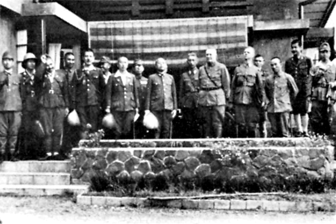 Deze foto is genomen voor het huis in Kalidjati waar de overgave van het KNIL werd getekend.